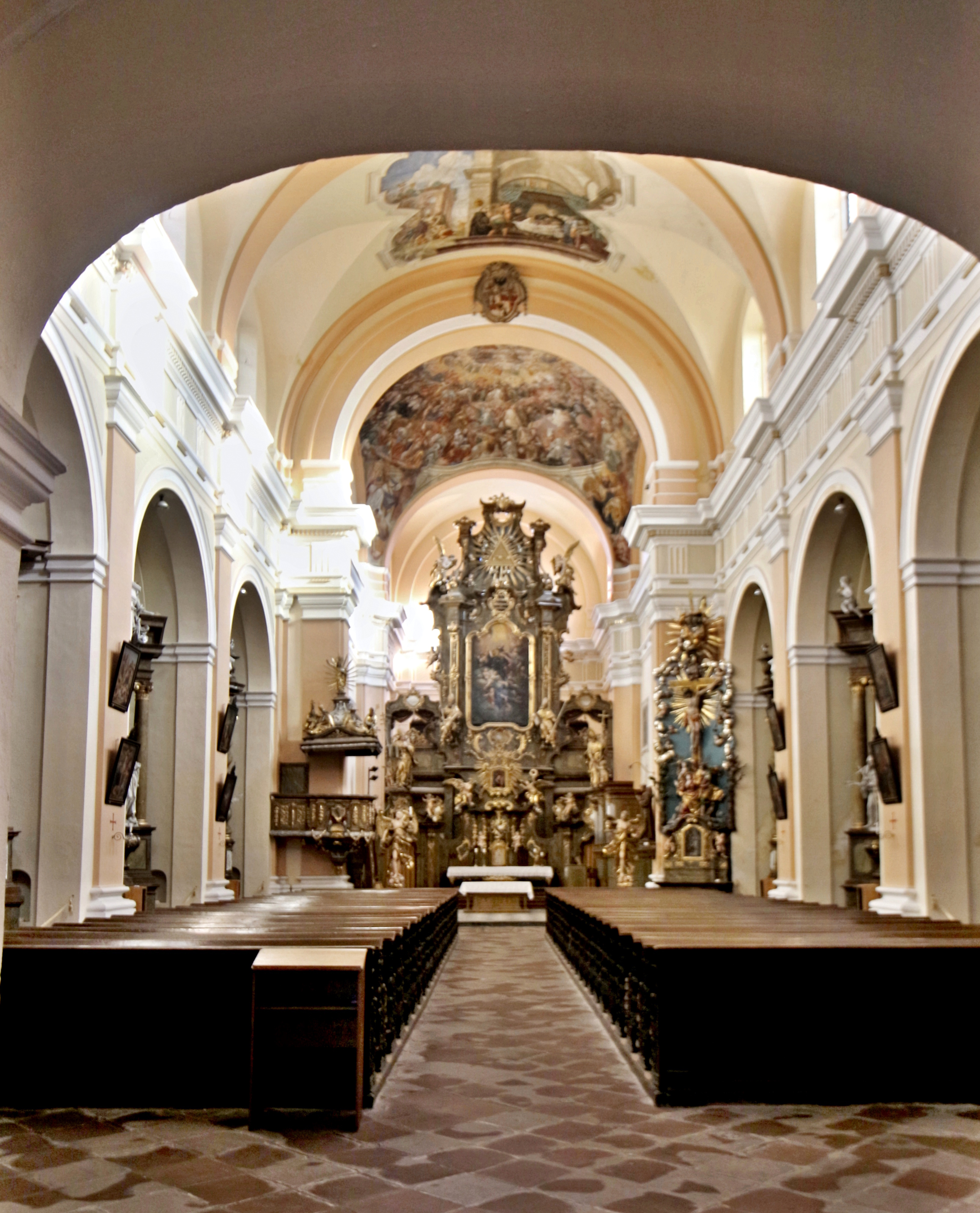 Augustiniánský klášter ve Vrchlabí